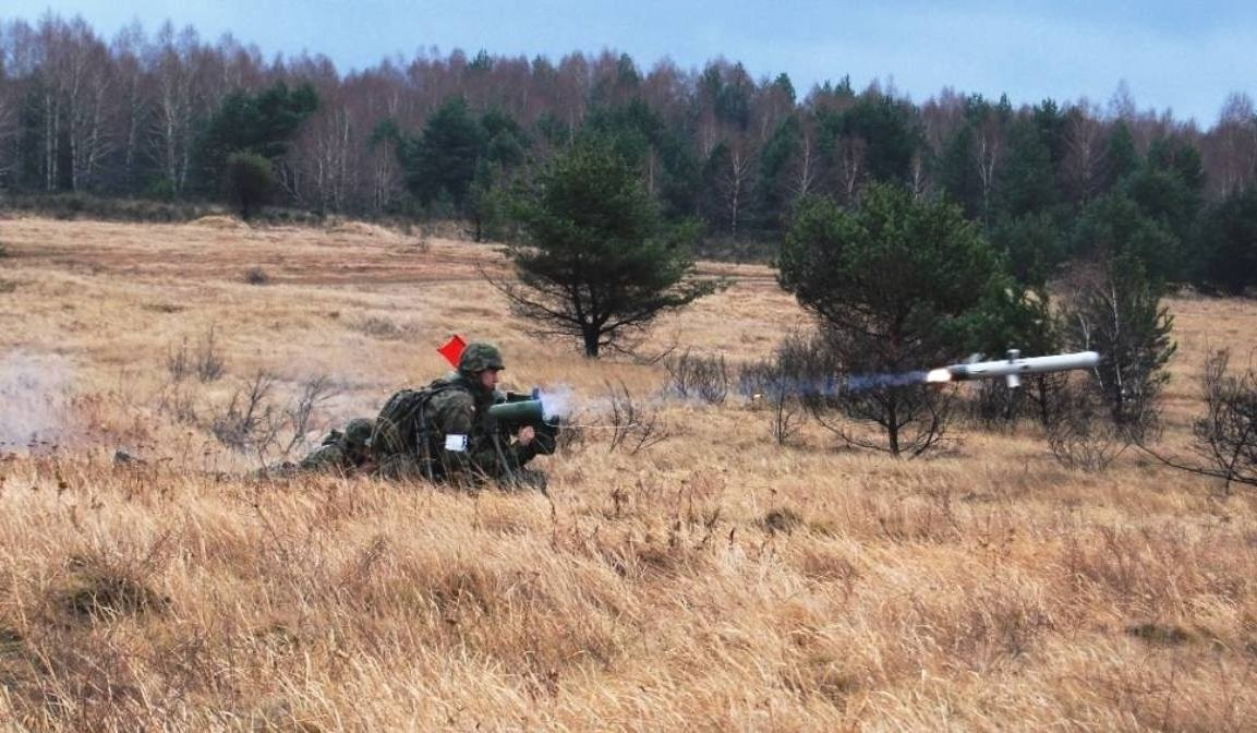 Żołnierze kompanii wsparcia 2bzmot podczas wykonywania zadanie ogniowego nr 1 z przeciwpancernych pocisków kierowanych "Spike"